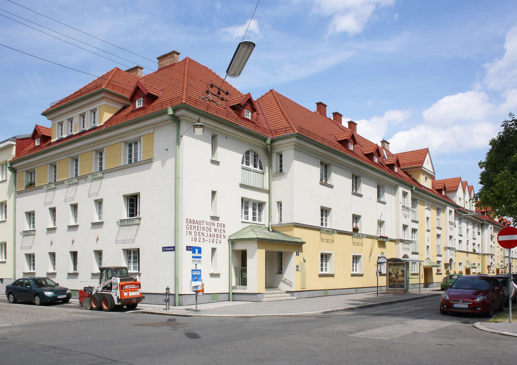 Die von 1923 bis 1924 nach Plänen der Architekten Konstantin Peller, Adolf Stöckl und Karl Julius Stoik errichtete und denkmalgeschützte Wohnhausanlage der Gemeinde Wien an der Adresse Justgasse 19-27 im 21. Wiener Gemeindebezirk Floridsdorf.